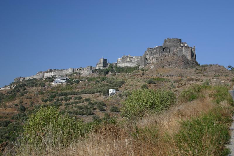 Margat Gesamtansicht, eigenes Foto von 2004, public domain